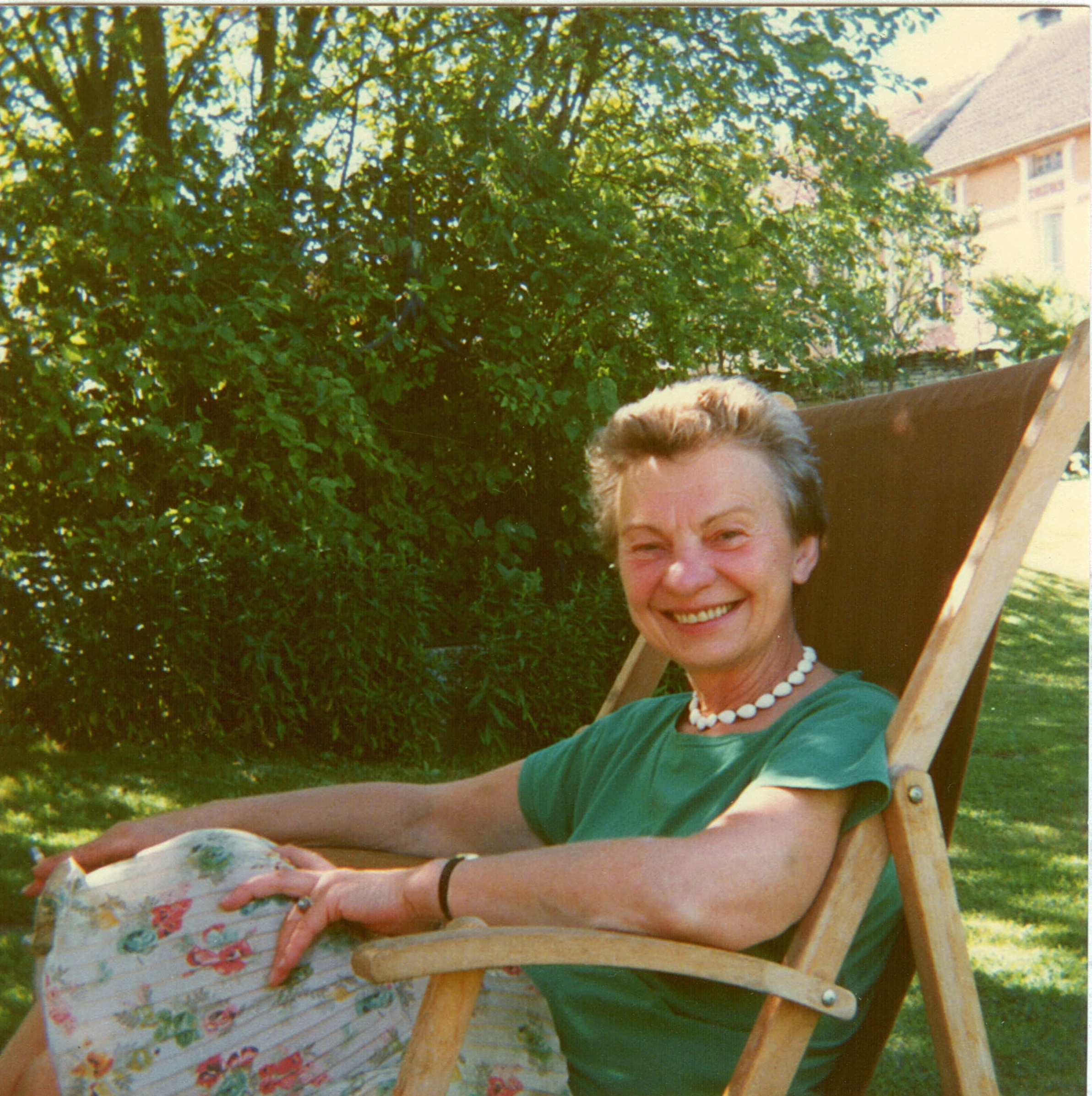 fotografia Zofii Romanowiczowej zrobiona przez córkę Barbarę w Jours w 1987 r.